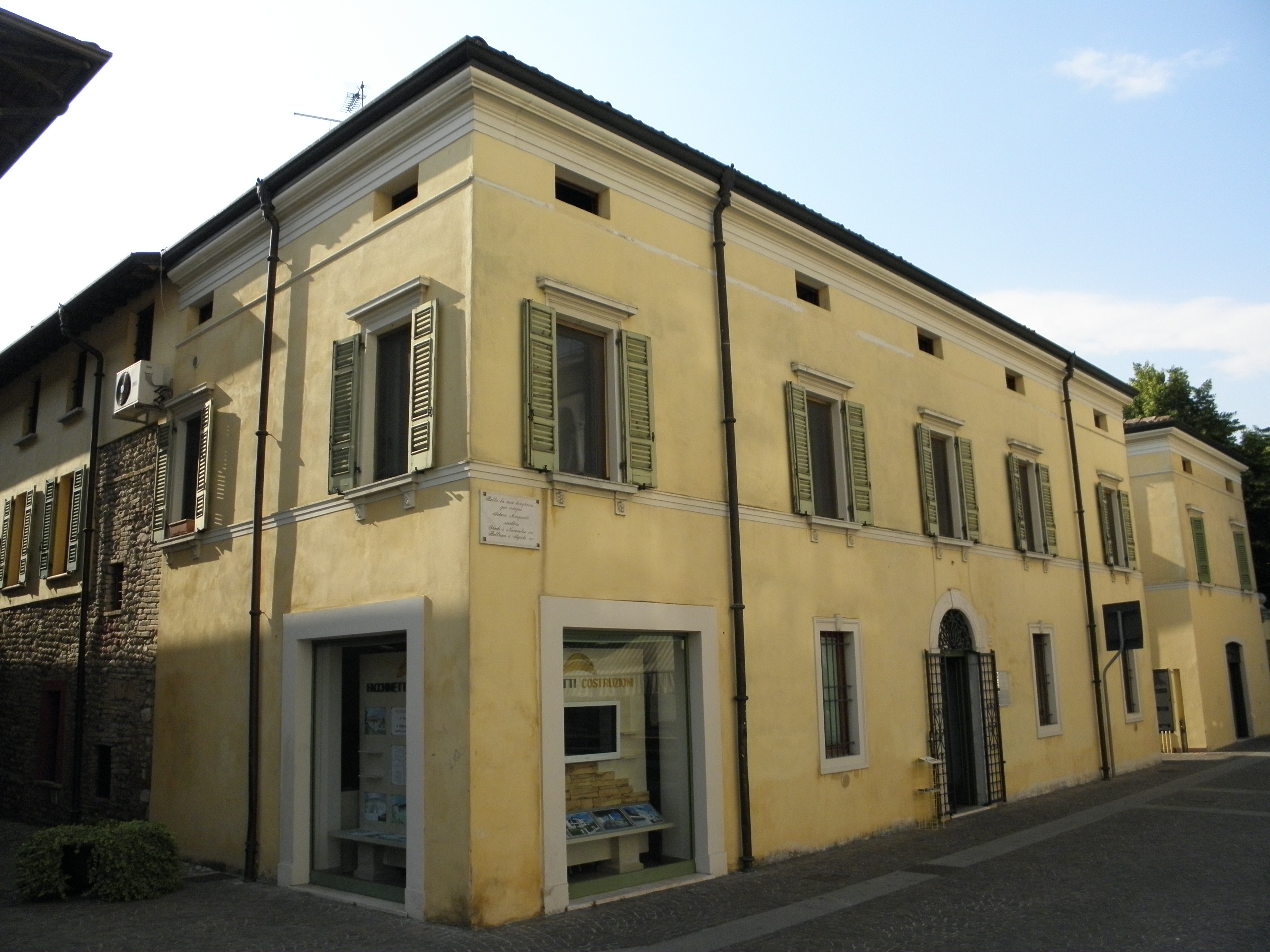 Ghedi, Via Trento: casa natale dello scrittore Arturo Marpicati.